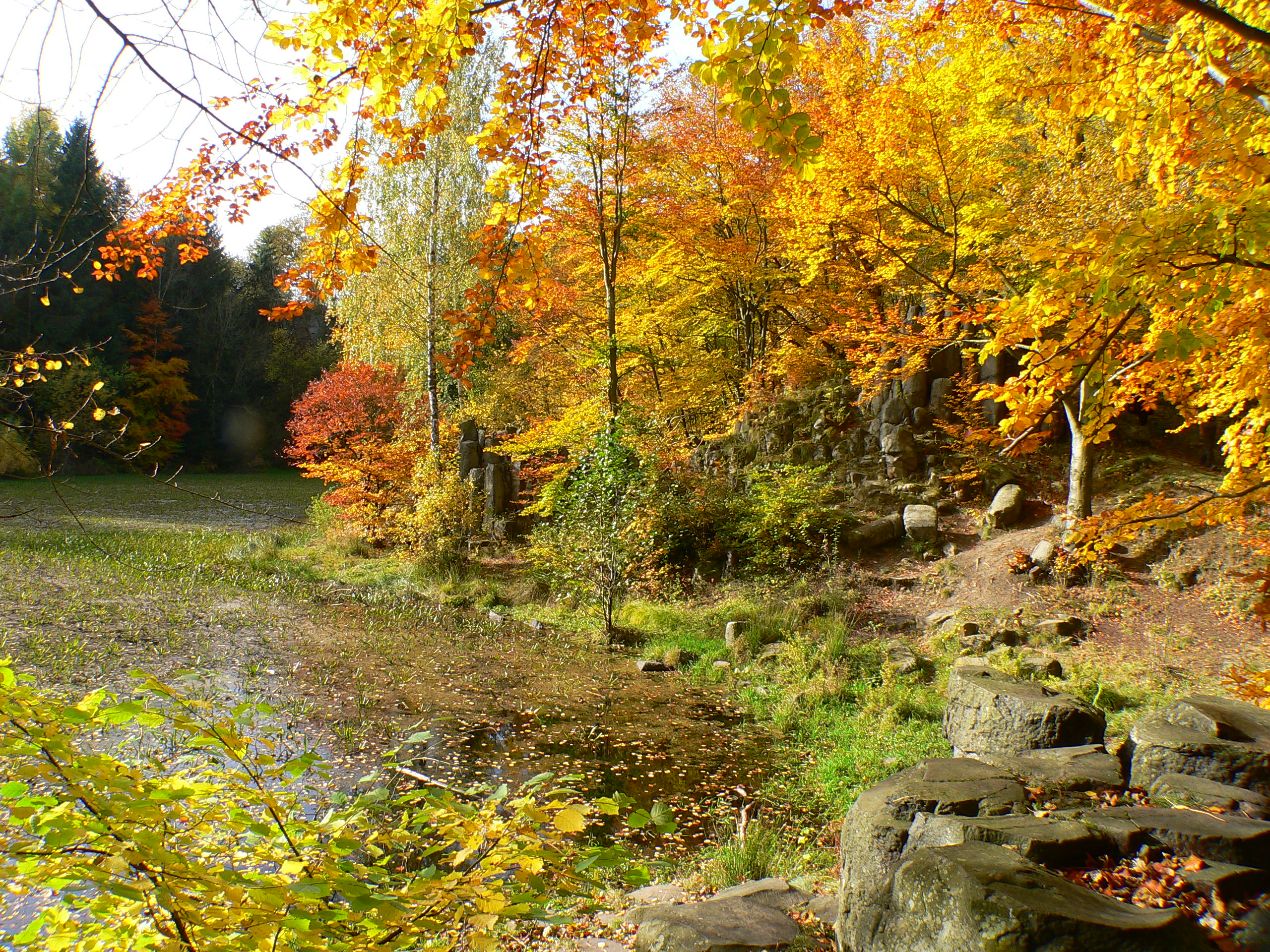 Ehemalige Basaltgrube Silbersee bei Habichtswald-Dörnberg im Landkreis Kassel, Hessen, Deutschland